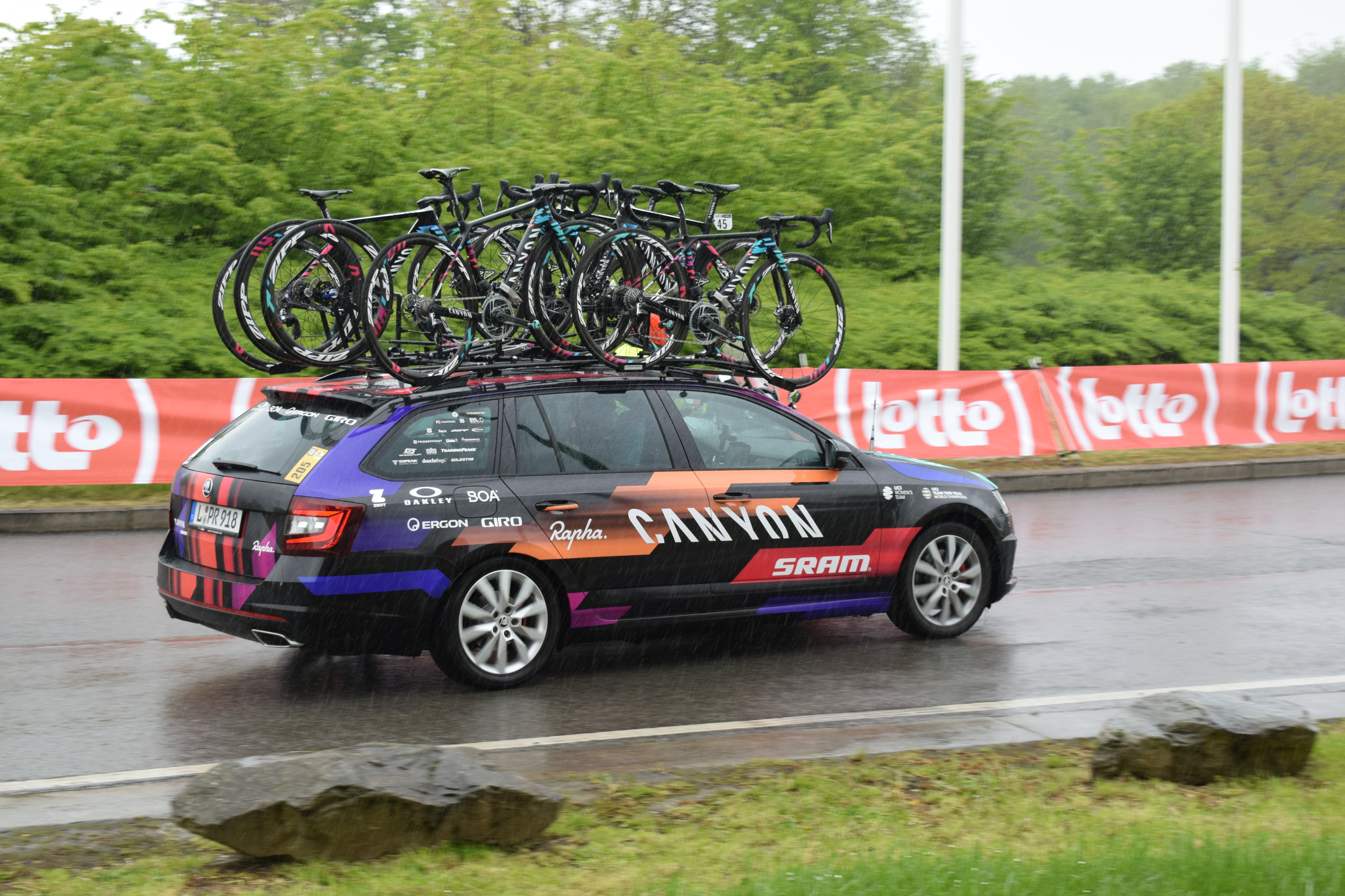 Vue du passage de la course cycliste Liège-Bastogne-Liège 2019, au rond-point Simone David-Constant, sur le campus du Sart Tilman de l'Université de Liège.